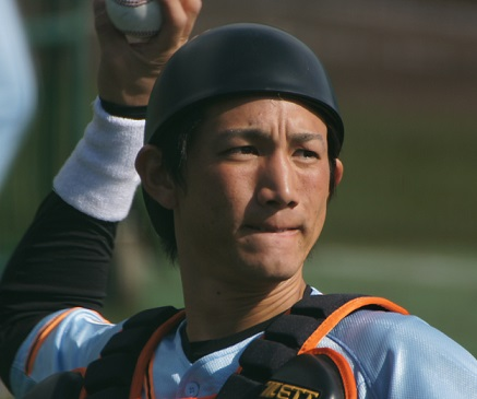 Giants_kobayashi_22